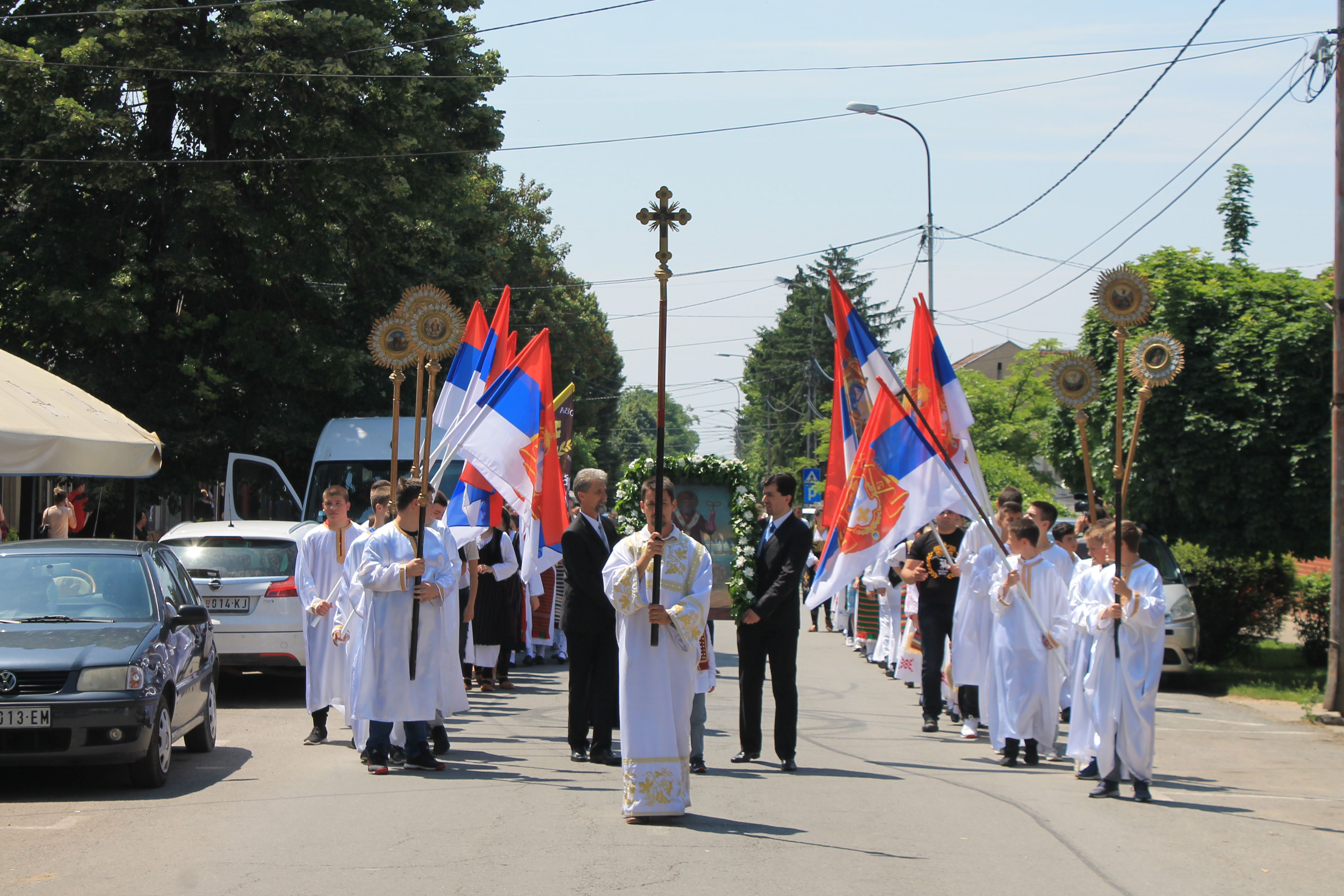 Litija povodom gradske Slave u Šidu, 22. maj 2018. godine